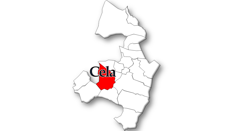 População